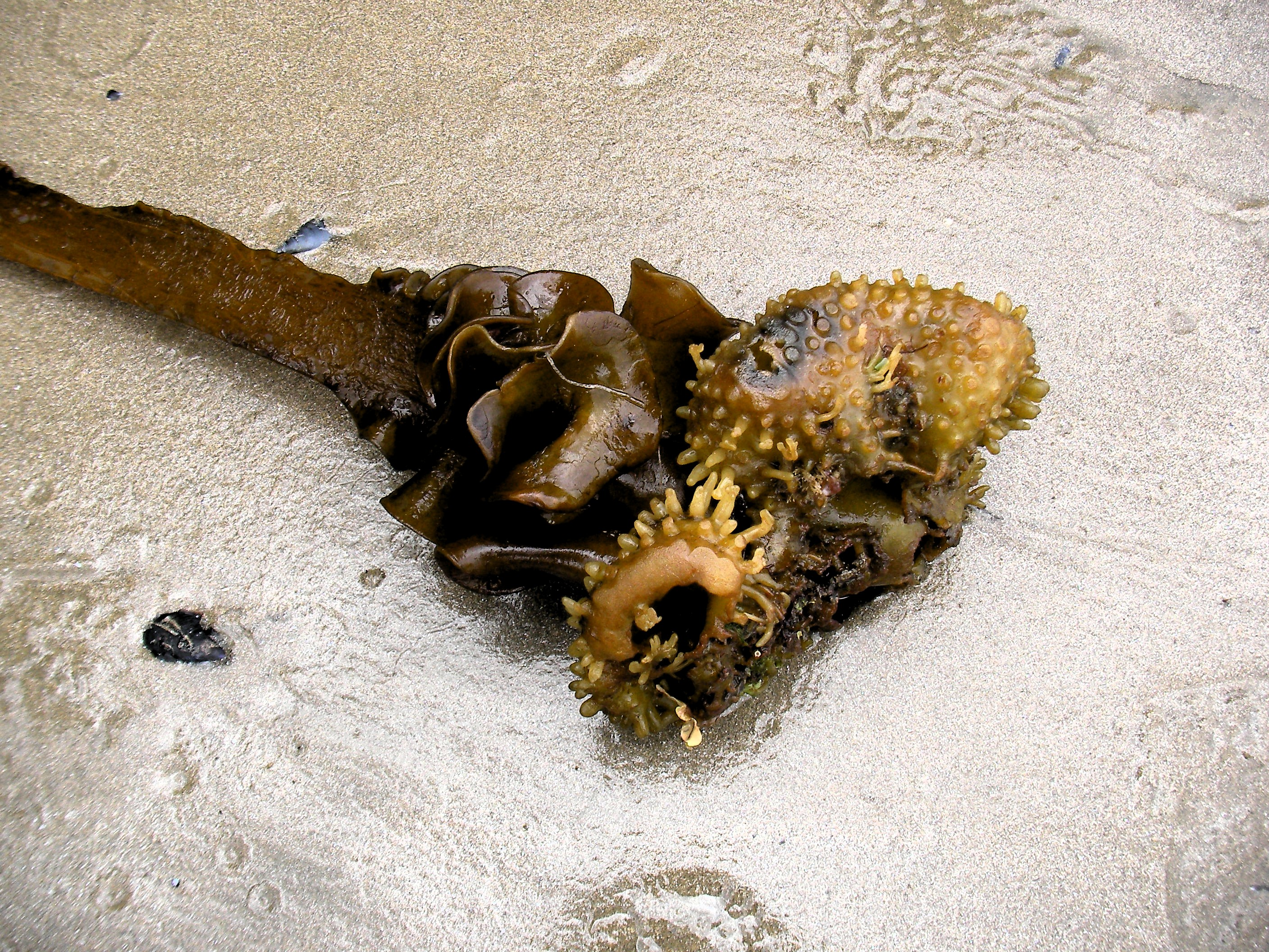 Rizoma ou bulbo da alga chamada Golfo (Saccorhiza polyschides). Nunha praia galega